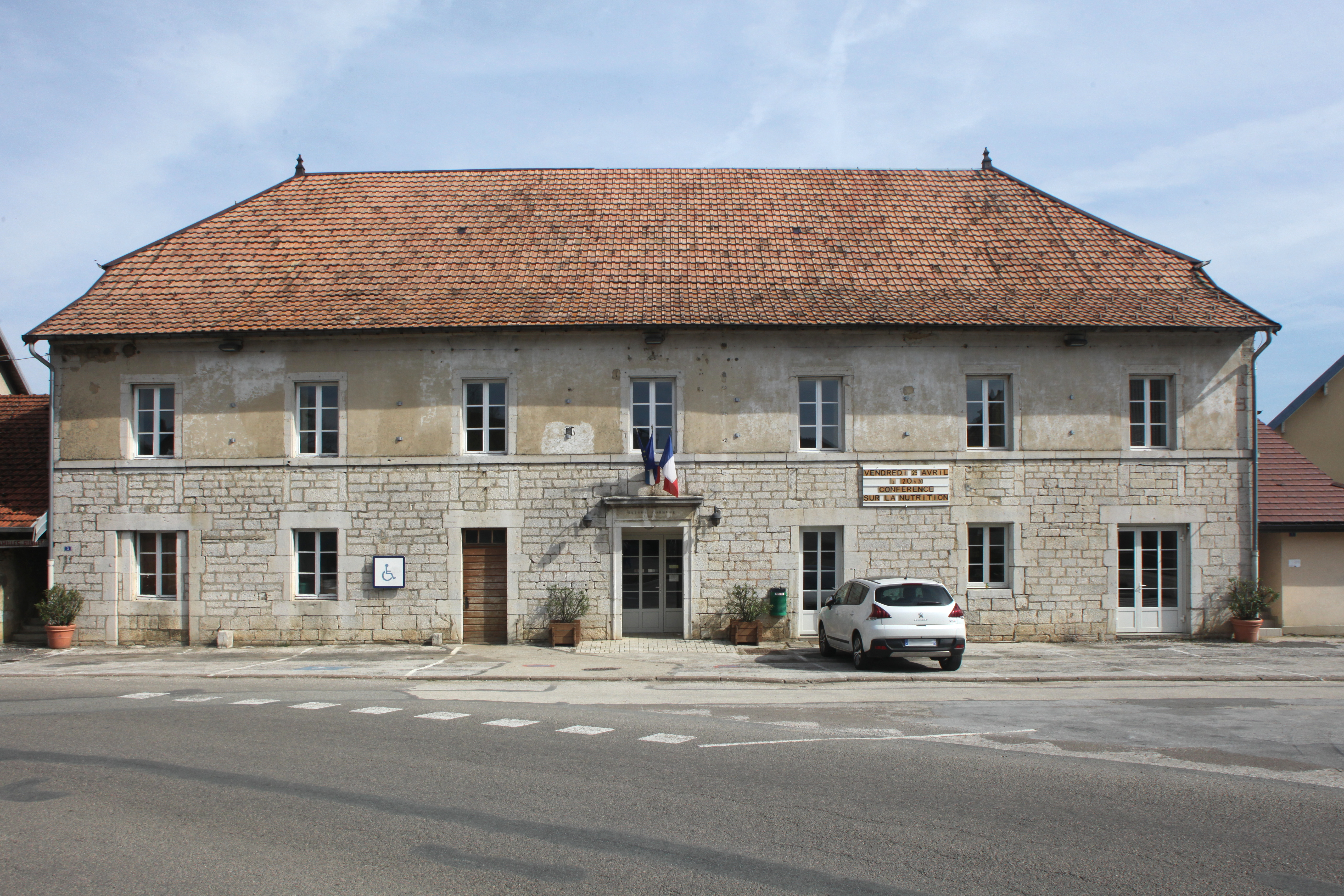 Mairie d'Amancey (Doubs).